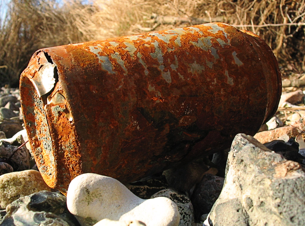 Beschreibung: angespülte korrodierte Dose / rusty drinks can Fotograf: Darkone, 15. Dezember 2004